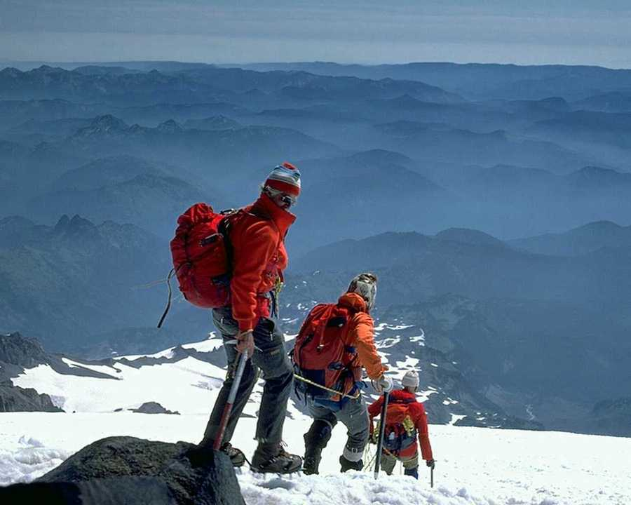 Des alpinistes.